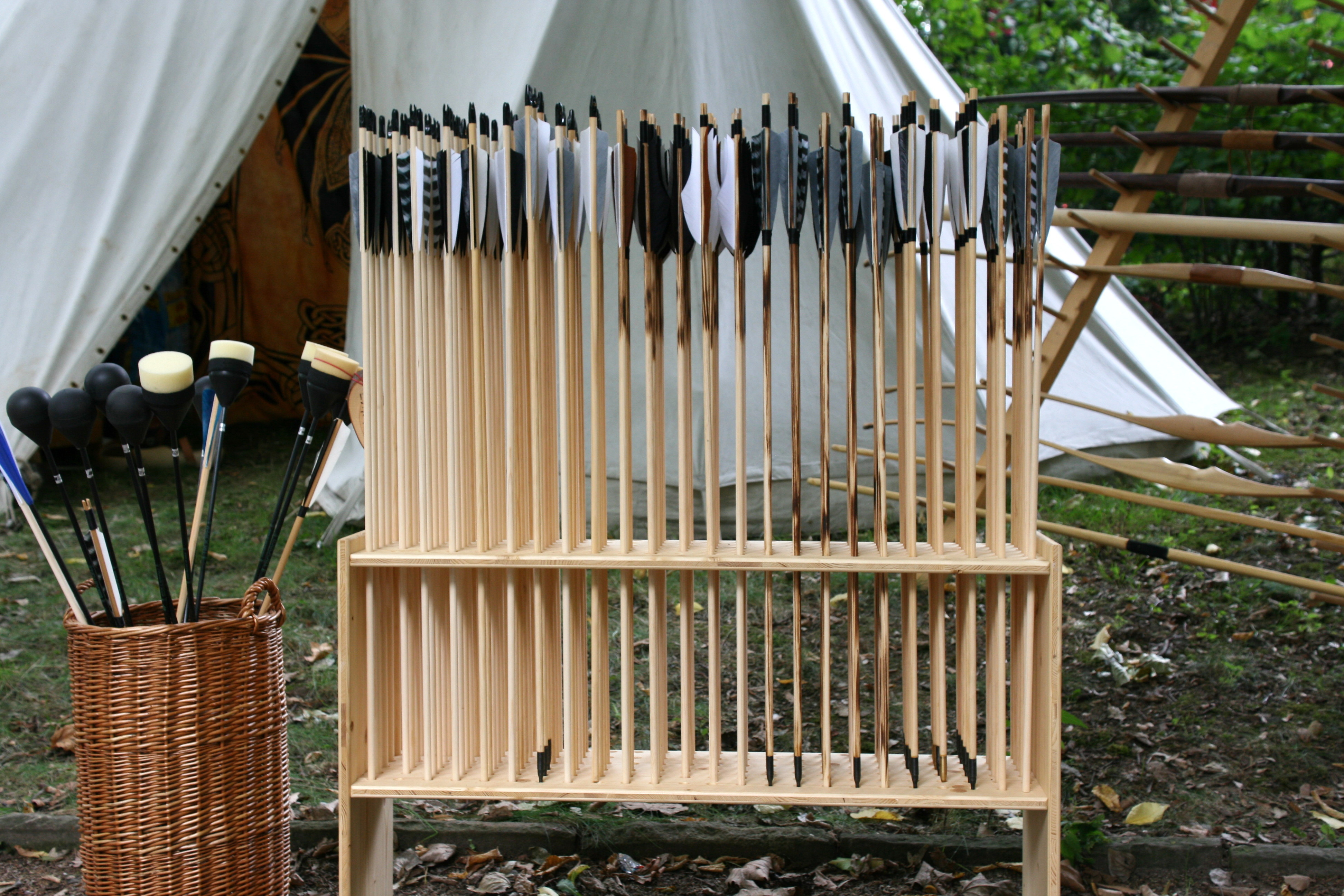 Gaudium.2010 am 22.08.2010 auf Schloss Horst in Gelsenkirchen-Horst